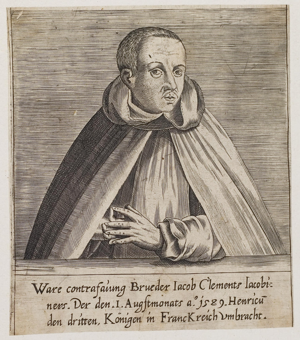 Grafik aus dem Klebeband Nr. 2 der Fürstlich Waldeckschen Hofbibliothek Arolsen Motiv: Jacques Clément, Mörder König Heinrich III. von Frankreich "Ware contrafaiung Brueder Iacob Clements Iacobiners. Der den I. Augstmonats a.o 1589 Henricu[m] den dritten, Königen in Franckreich umbracht"